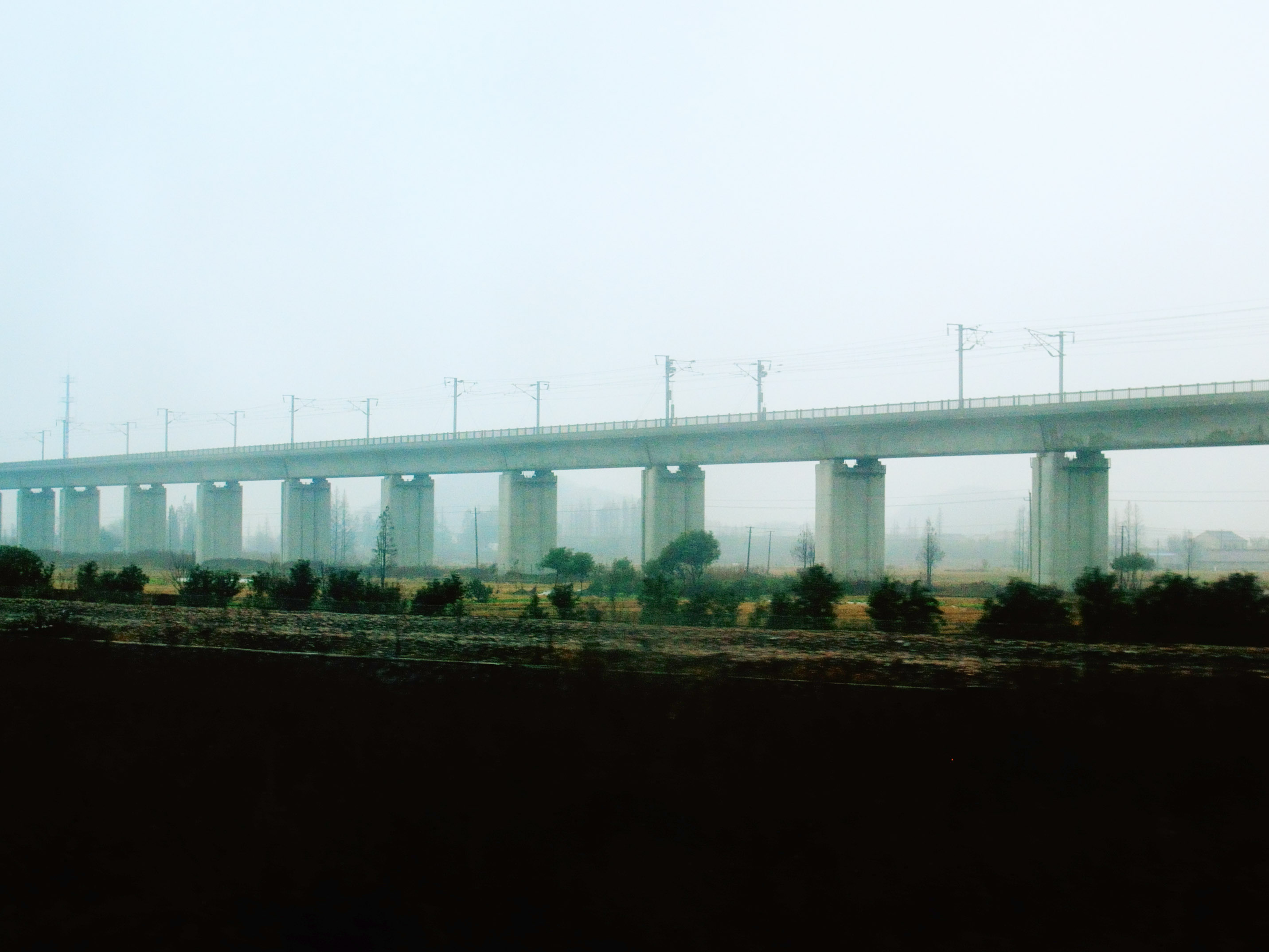 杭甬客专宁波特大桥